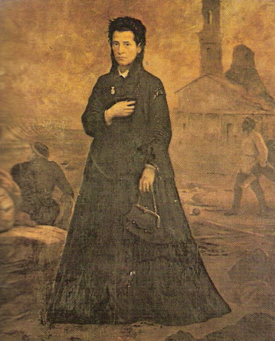 Ana Justina Ferreira Néri, pioneira brasileira da enfermagem